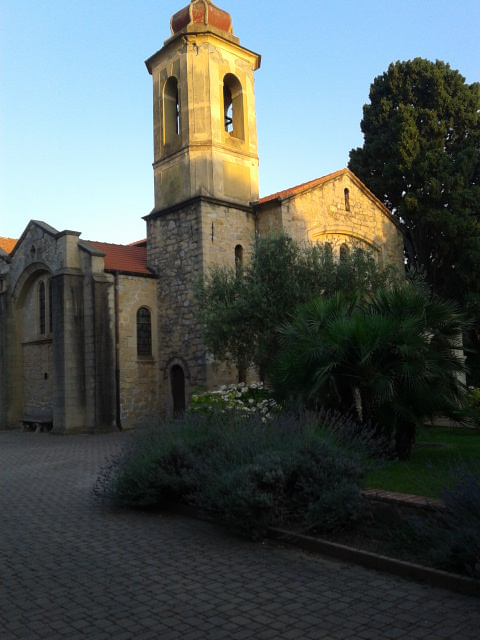 Vue latérale de l'Eglise Anglicane